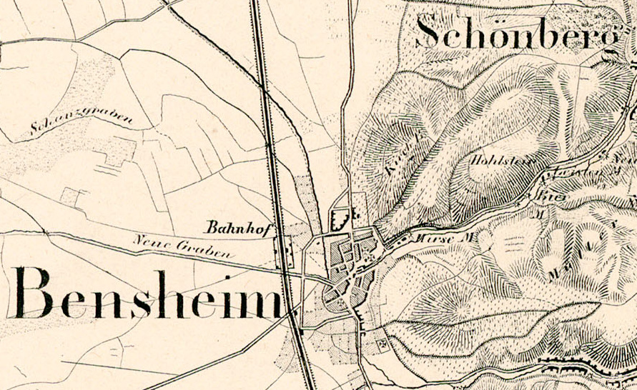 Historische Karte des Großherzogtums Hessen von 1832 bis 1850. Im Maßstab 1:50.000. Blatt 26: Worms. Mit Worms, Guntersblum, Biebesheim, Gernsheim, Zwingenberg, Bensheim, Heppenheim, Lorsch, Biblis, Seeheim, Bürstadt, Alsbach, Hähnlein, u.a. Orten